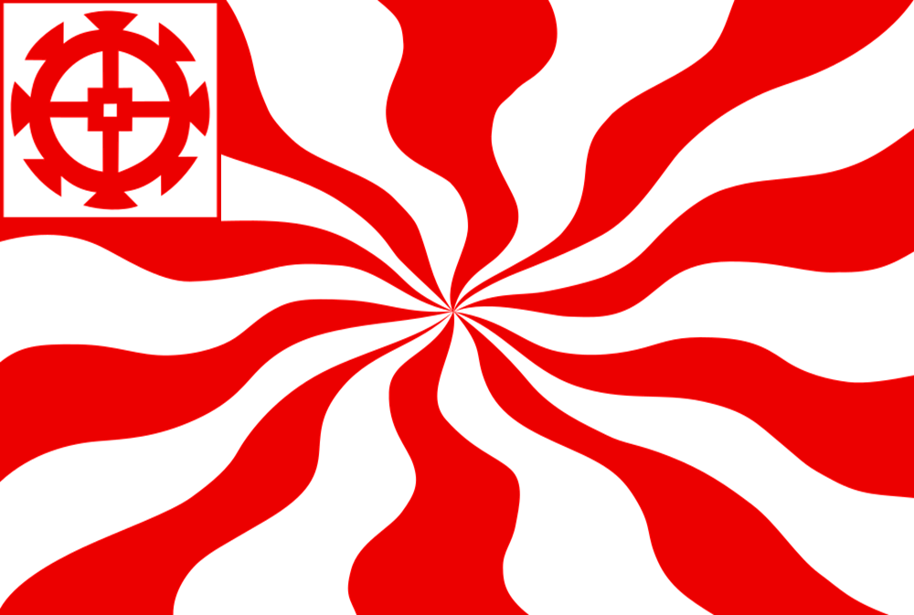 Drapeau de Mulhouse